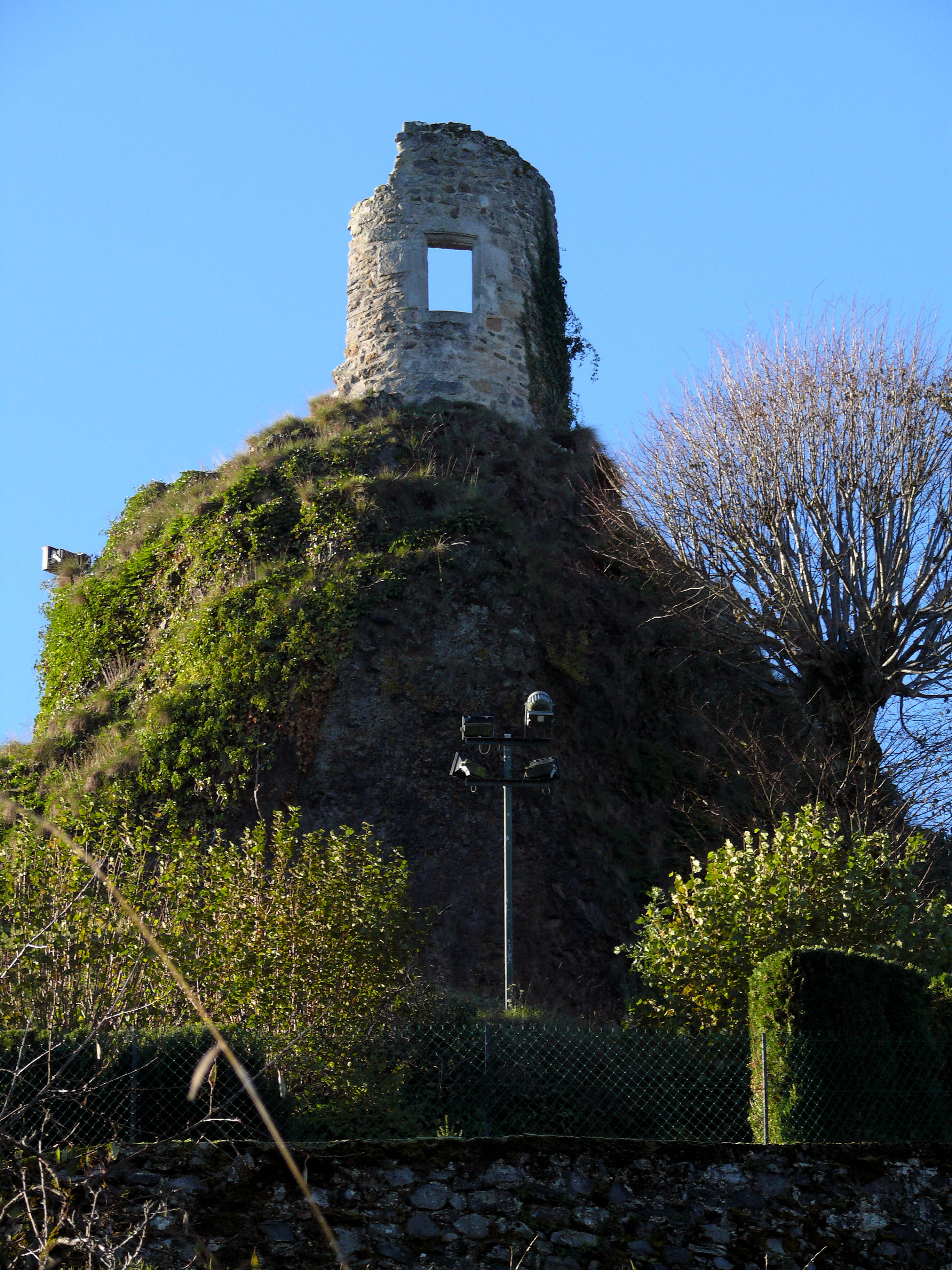 Saignes - Vestiges du château